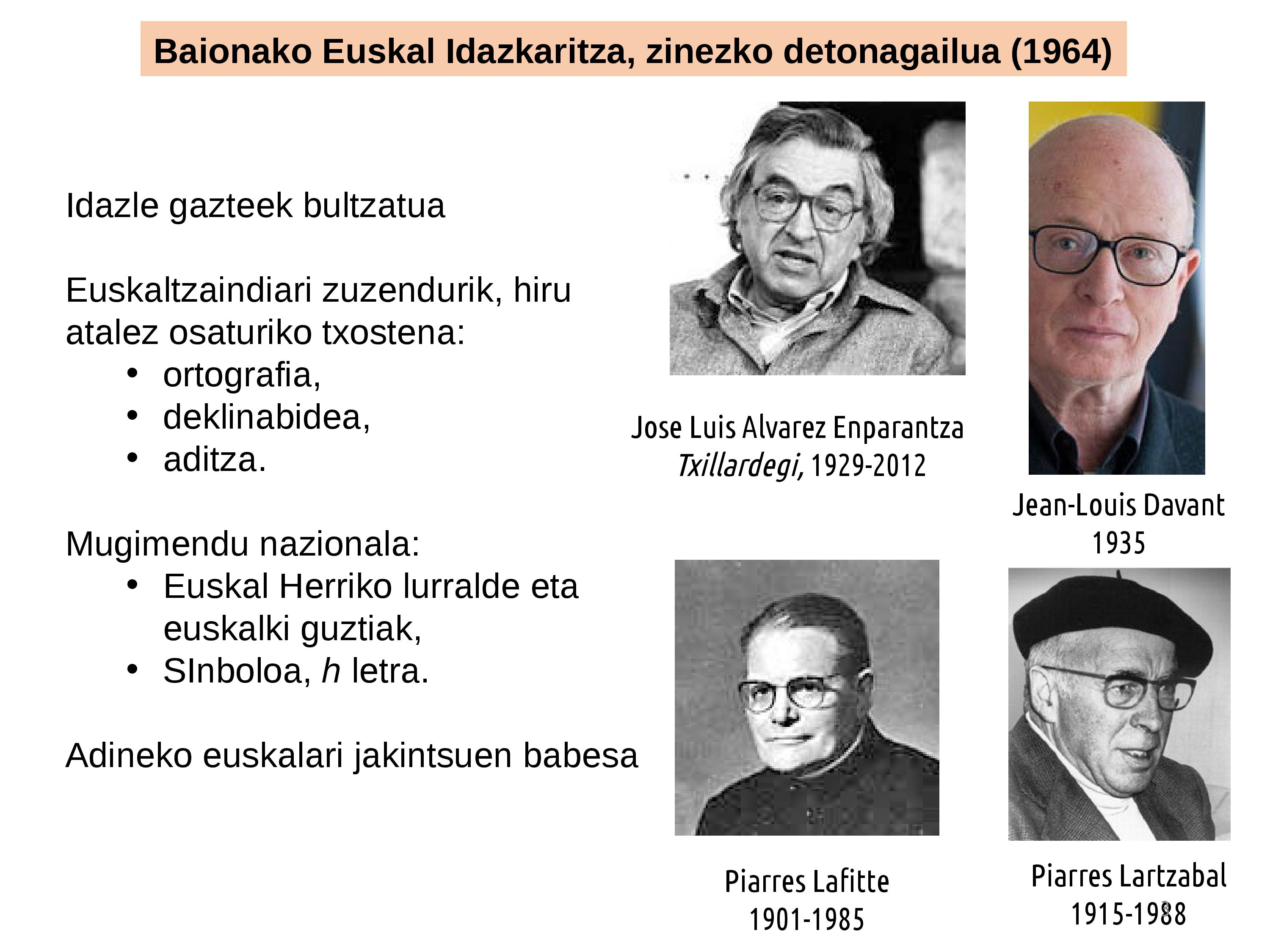 1964ko Baionako Euskal Idazkaritza. Euskara Batuaren helduaroa Jardunaldiaren barruan (Gasteiz, 2018-06-21). Jose Ramon Etxebarriak bere hitzaldian euskarazko testugintzan bere helburuak, lanak eta bidelagunak aipatu zituen (Euskarazko testugintza. Amaitu gabeko historiaren atal baten bertsio pertsonala).